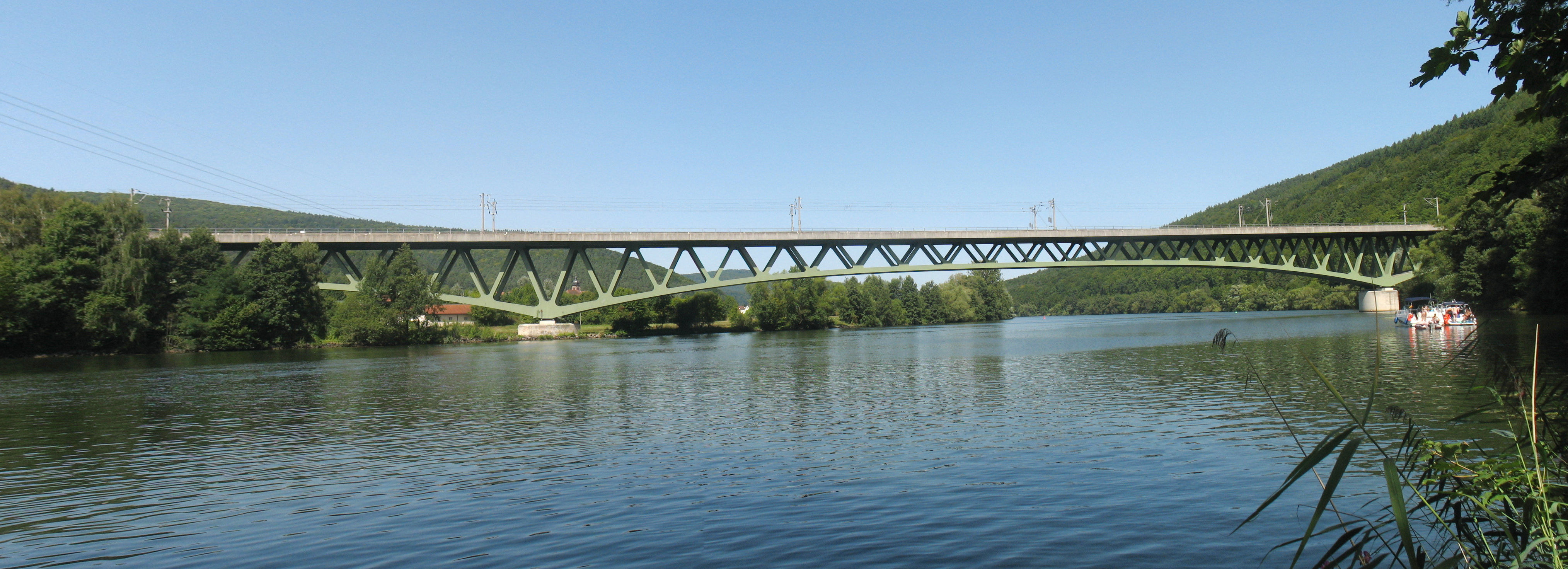 Eisenbahnbrücke über den Main bei Nantenbach.